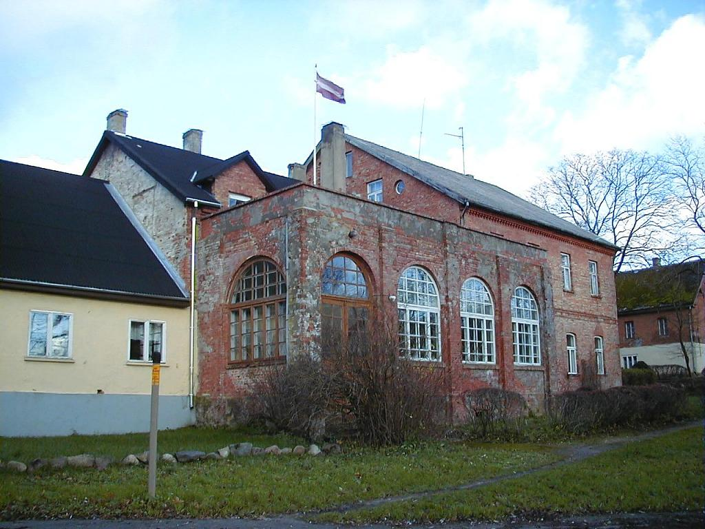 Virgas muižas pils 2001-11-10